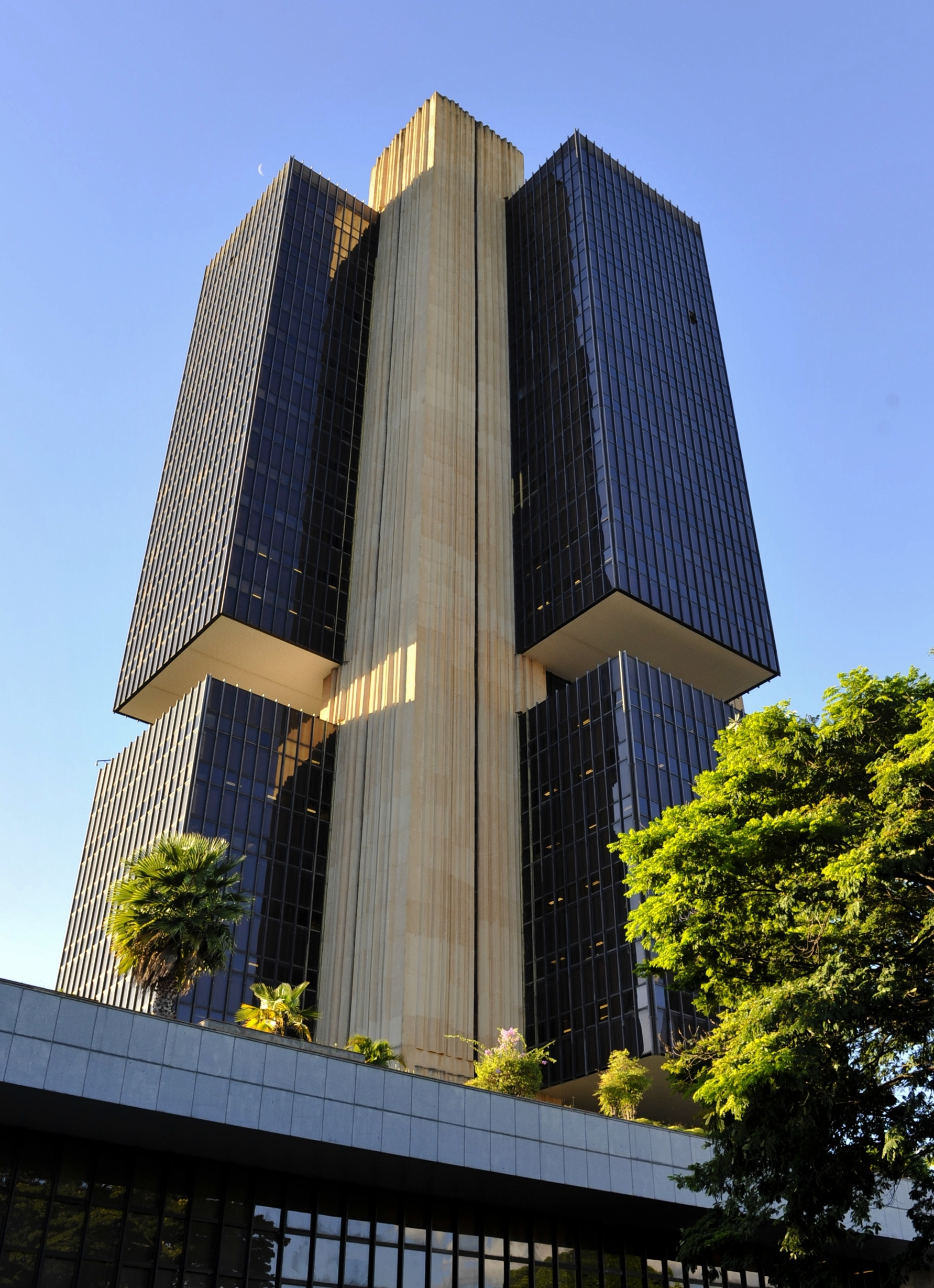 Edifício sede do Banco Central do Brasil. Foto: Jonas Pereira/Agência Senado